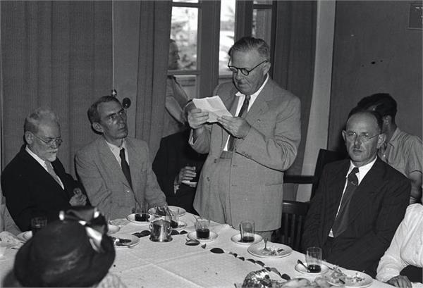 ירושלים - טקס מתן פרס אוסישקין לשנת תש"ז-חתני הפרסמר פיכמן וד"ר ליפשיץ, מר יעקב פיכמן משיב למברכים.